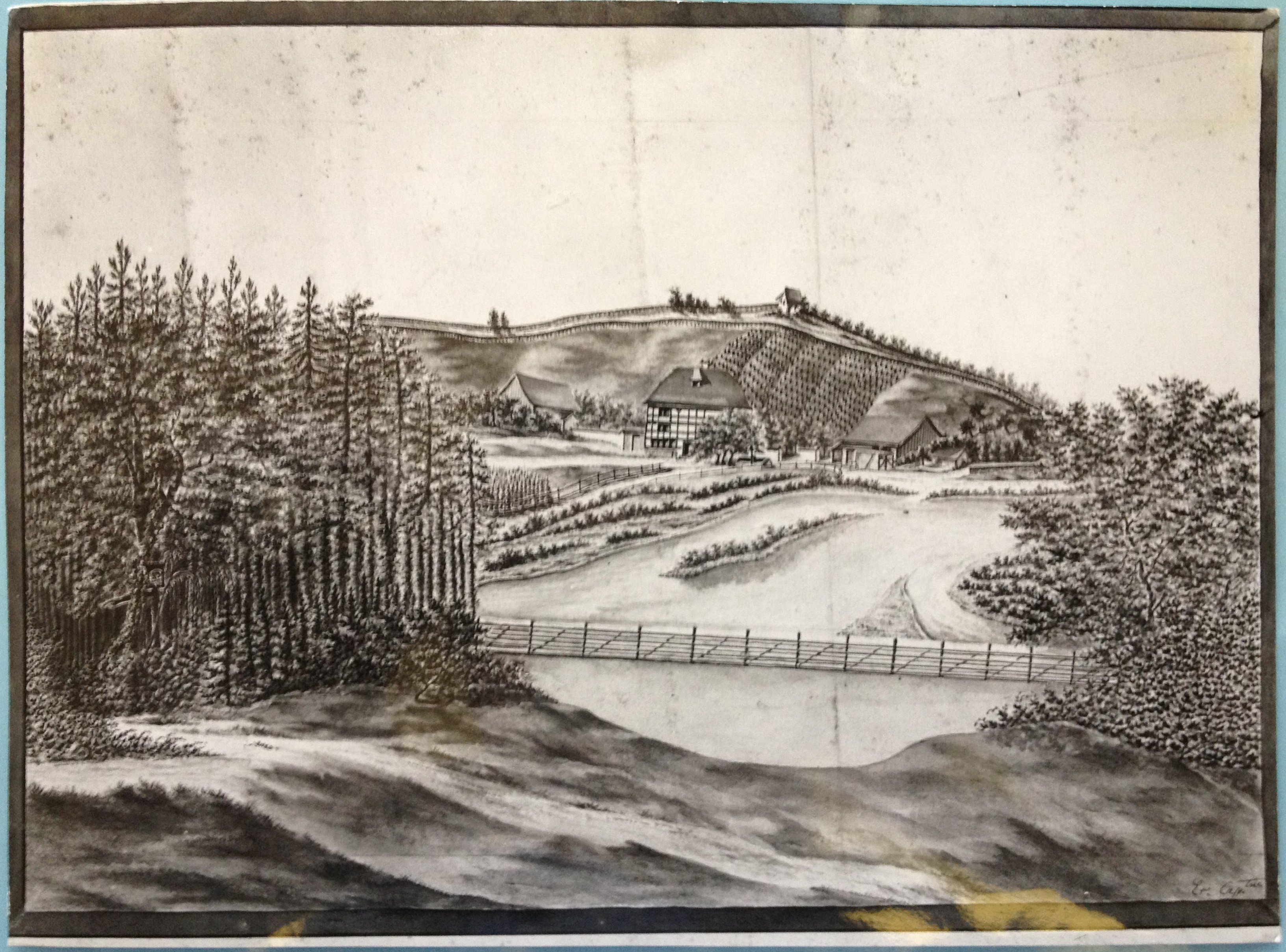 "Das Sonnenzeit" lautet der Titel einer Zeichnung, die auf Capitain Esslinger vom Jahre 1800 zurückgeht (Quelle: Alt-Wiedikon von Au bis Ziegelhütten, Paul Etter, 1977). Mit freiem Flusslauf der Sihl und den Rebhügeln im Hintergrund. - Standort einer Fotografie: Heimat- und Ortsmuseum Zürich-Wiedikon). "Sonnenzeit" ("Sunnezyt") wurde dann auch das spätere Restaurant am heutigen Manesseplatz benannt.